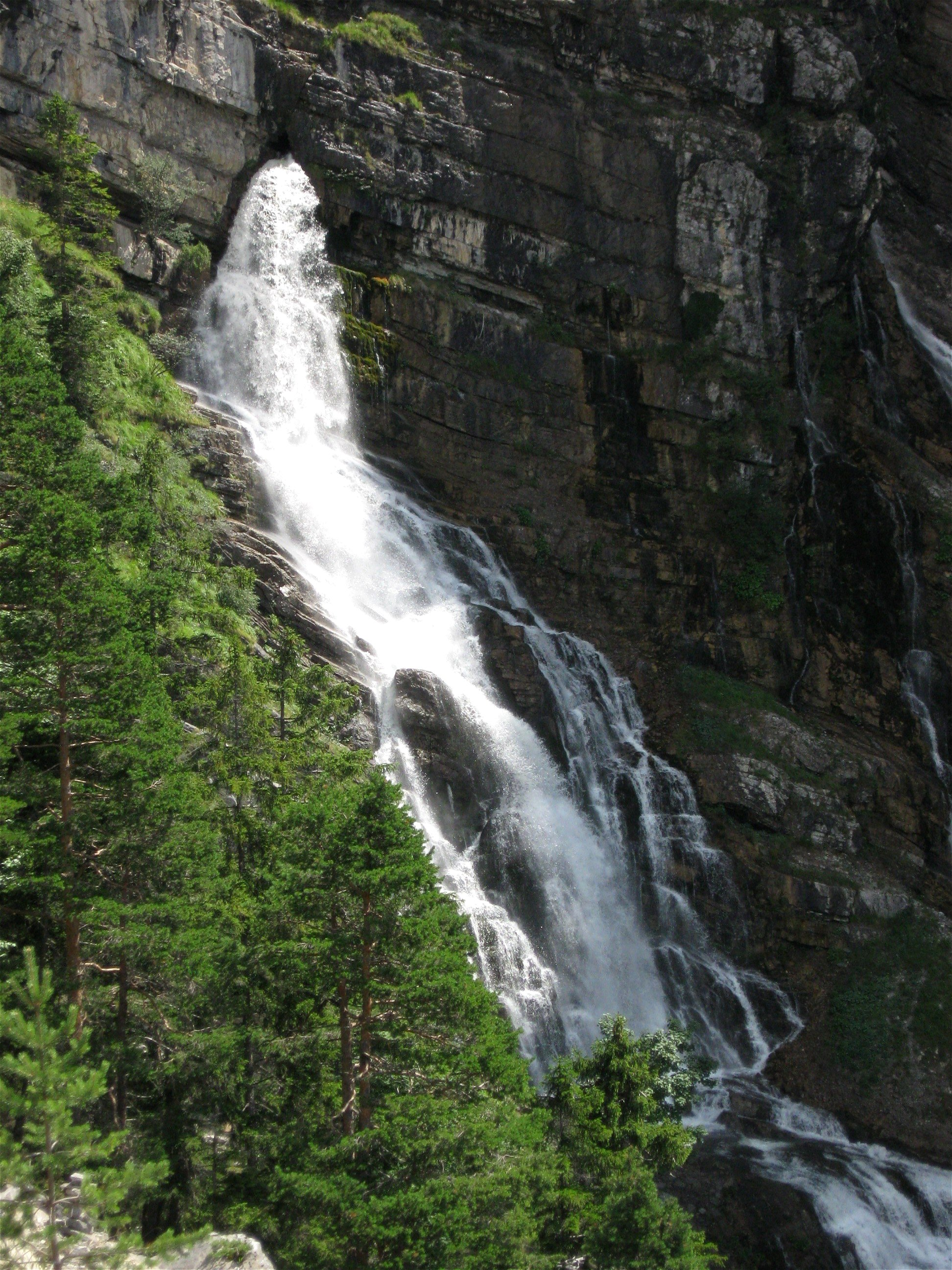 Kuhfluchtwasserfälle, Farchant